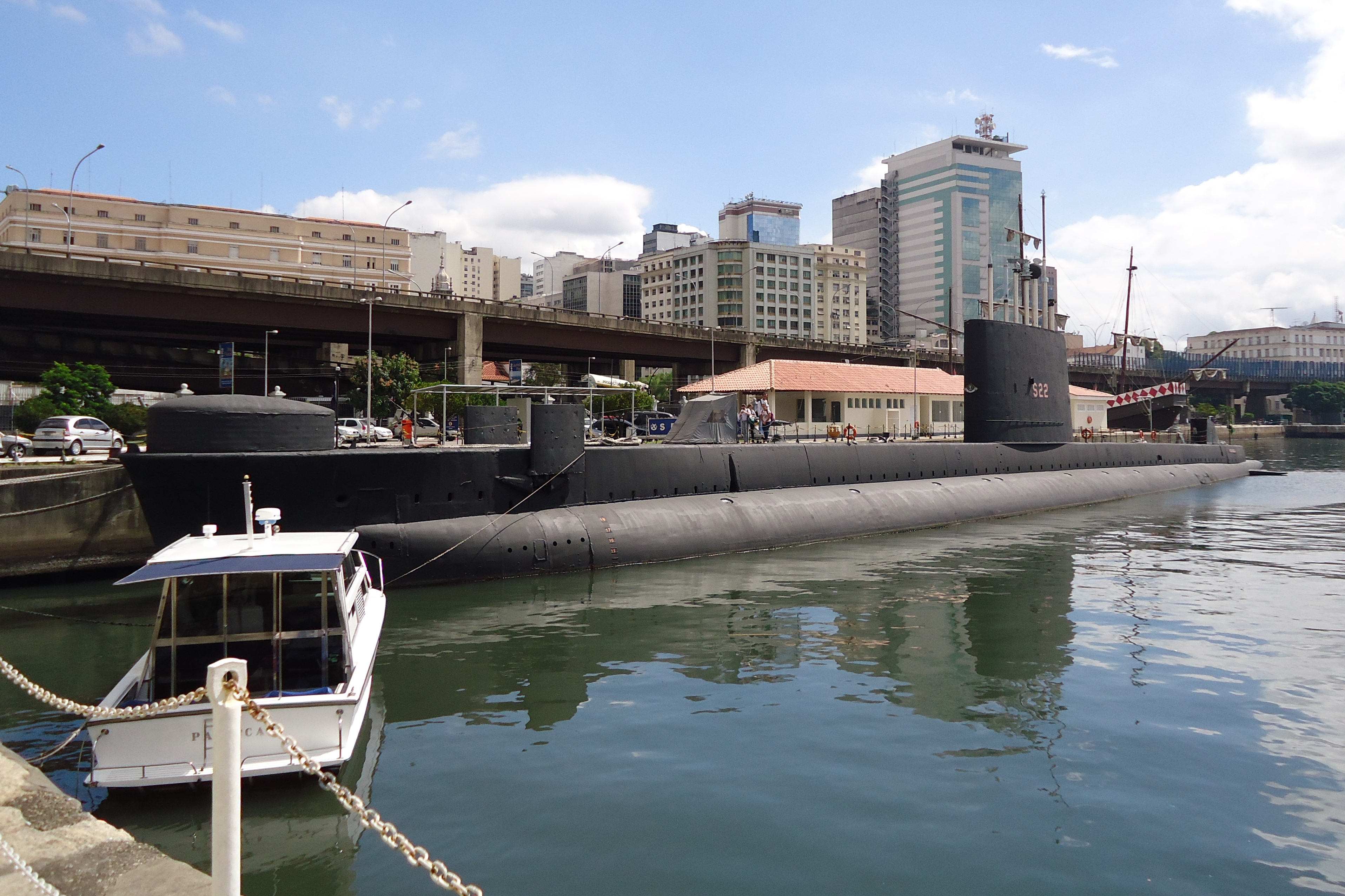 Espaço Cultural da Marinha, Rio de Janeiro, Brasil: submarino-museu S22 Riachuelo.